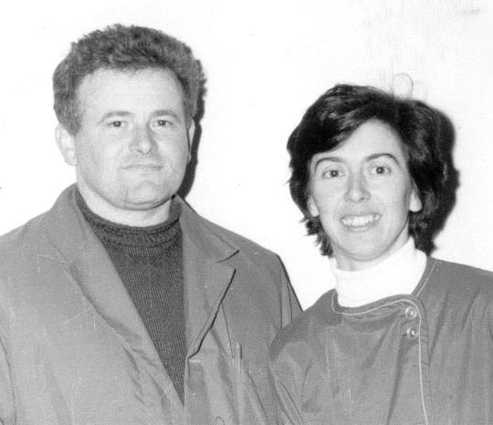 Couple d'instituteurs de Millebosc